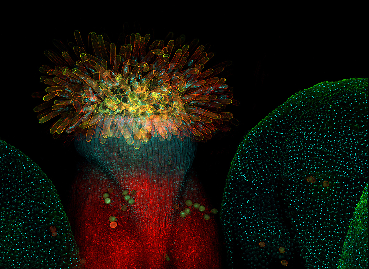 Harilik müürlook (Arabidopsis thaliana) on ristõieliste sugukonda kuuluv tavaline umbrohi. Harilik müürlook oli esimene taim, mille kogu genoom sai sekveneeritud aastal 2000. Seetõttu on müürlook taimebioloogide hulgas armastatud uurimisobjekt. Isetolmlemine teeb müürlooga iseäranis käepäraseks mudeliks: järglased (seemned) tulevad ilma kõrvalise abita, taimeliinide omavahelist ristumist on lihtne ära hoida. Pildil on fluorestseeruvate värvidega töödeldud õis: stigma, kroonlehed, tolmuterad.